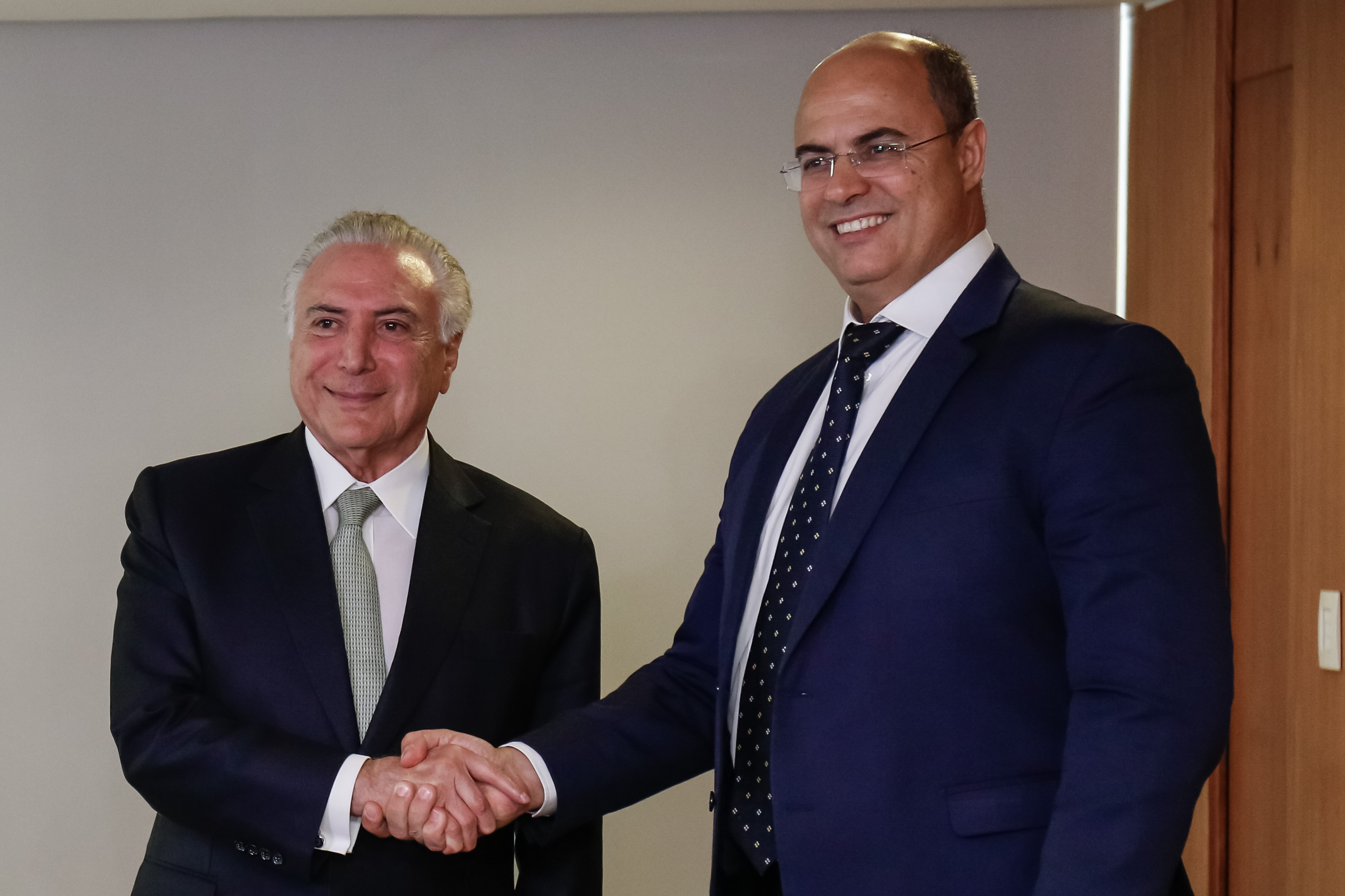 (Brasília - DF, 07/11/2018) Presidente da República, Michel Temer cumprimenta o Governador eleito no Estado do Rio de Janeiro, Wilson Witzel.Foto: Alan Santos/PR